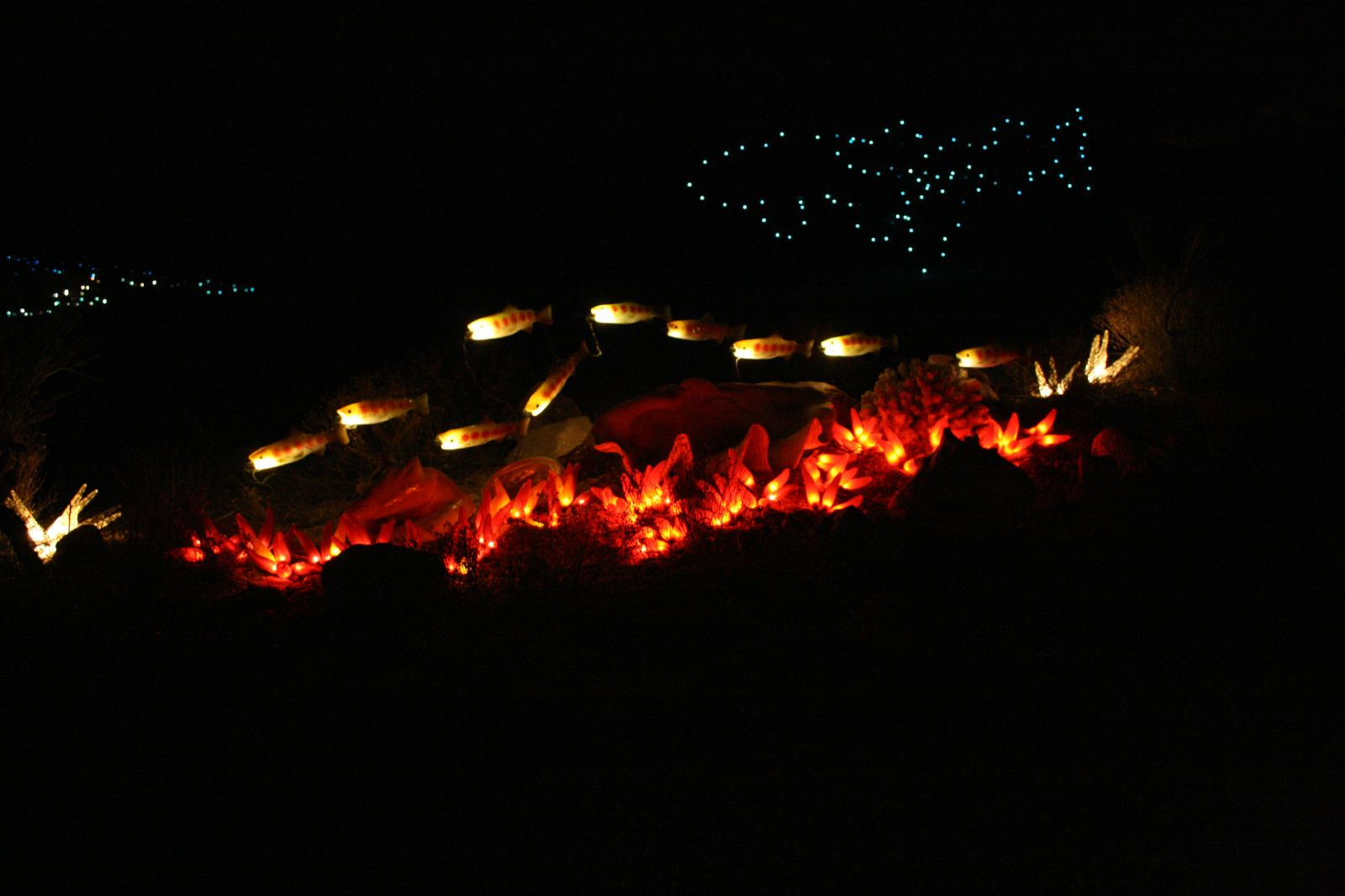 2007 GLOW art event, Oracle AZ